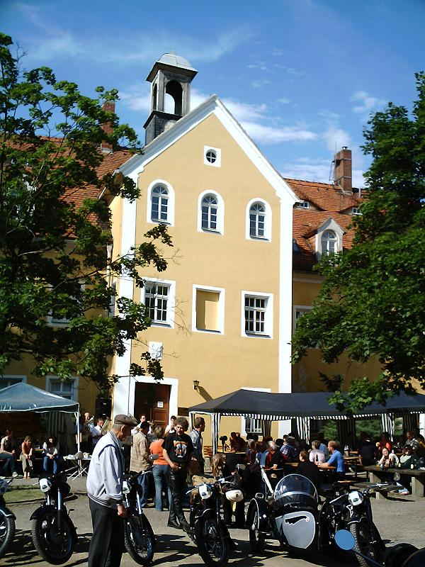 1. Oldtimermotorradgedenkfahrt, Schlosshof